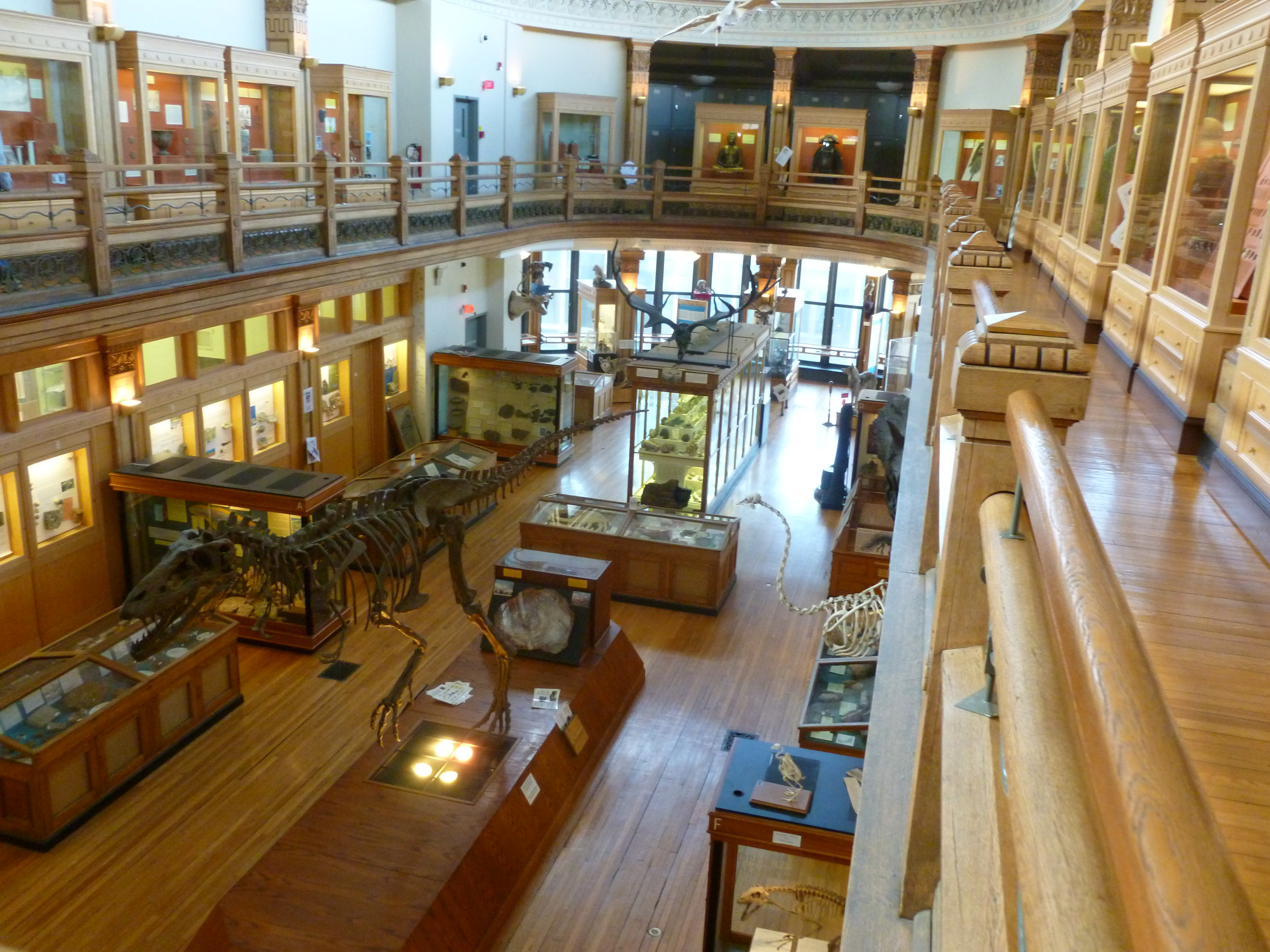 L'intérieur du musée Redpath, Montréal, Québec Canada